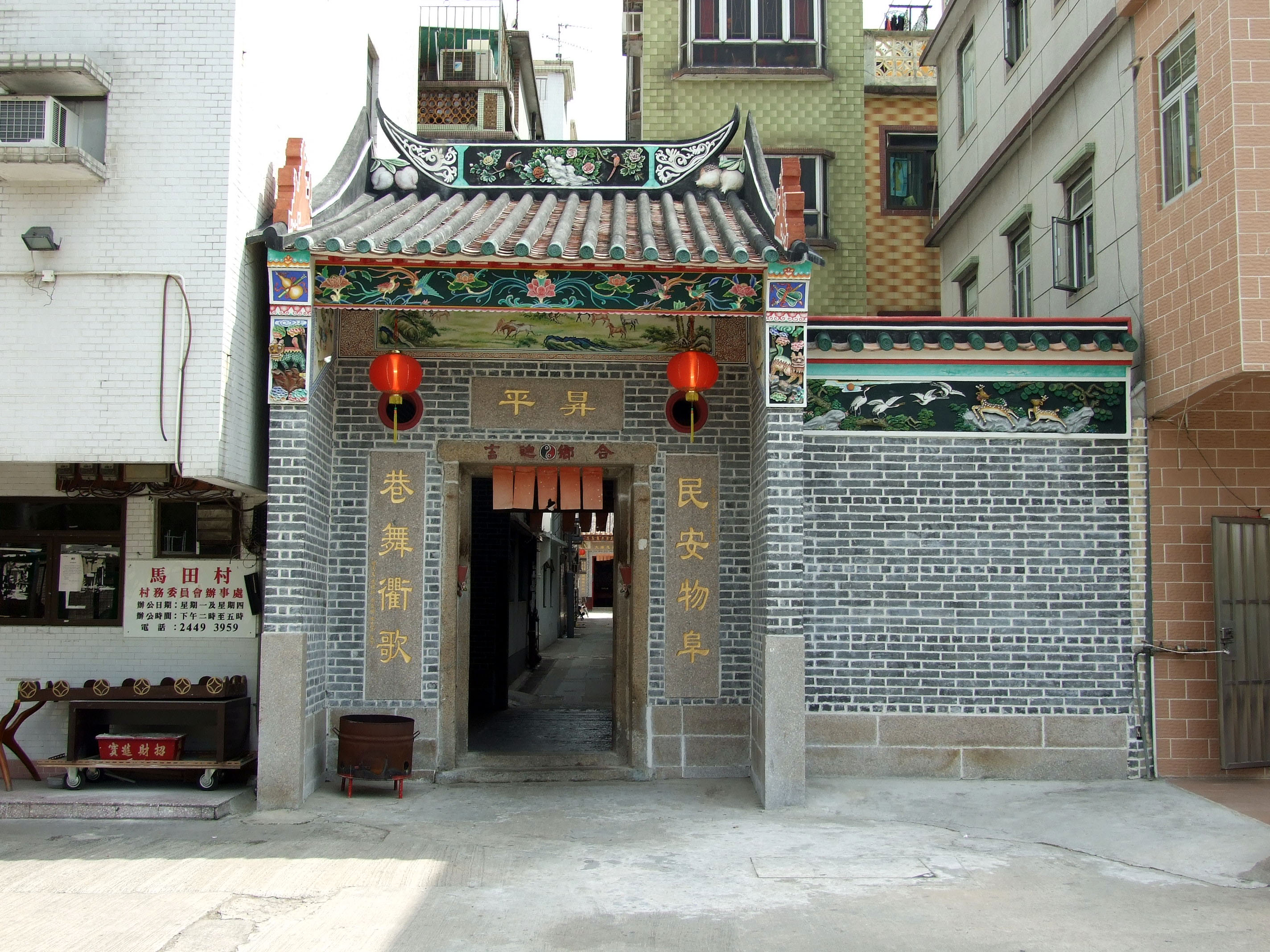 中文（香港）: 十八鄉馬田村